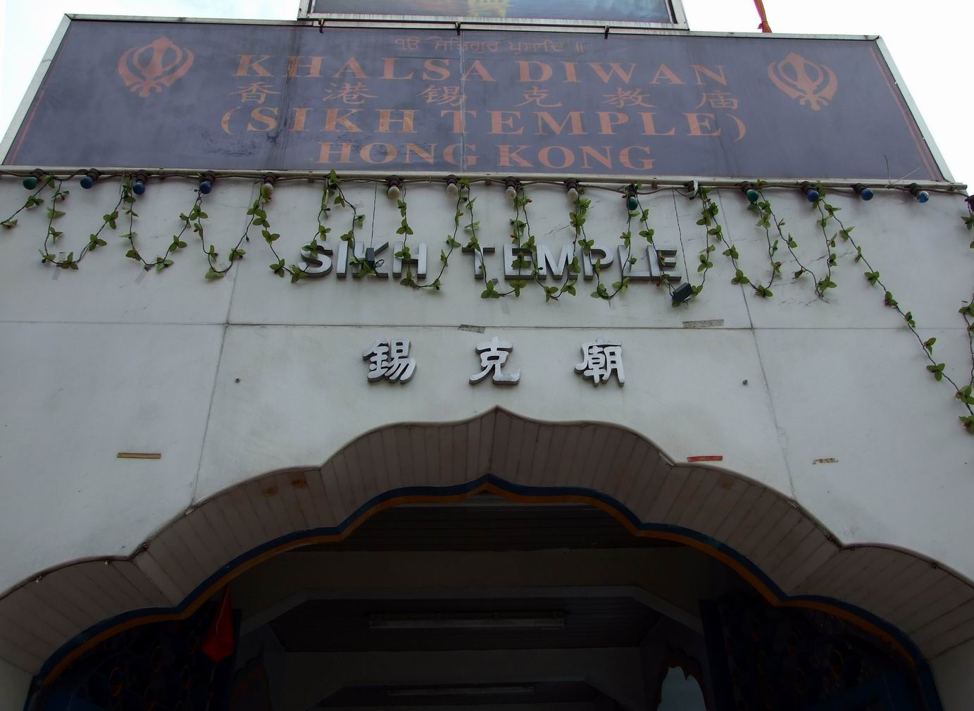 灣仔錫克教廟皇后大道東入口